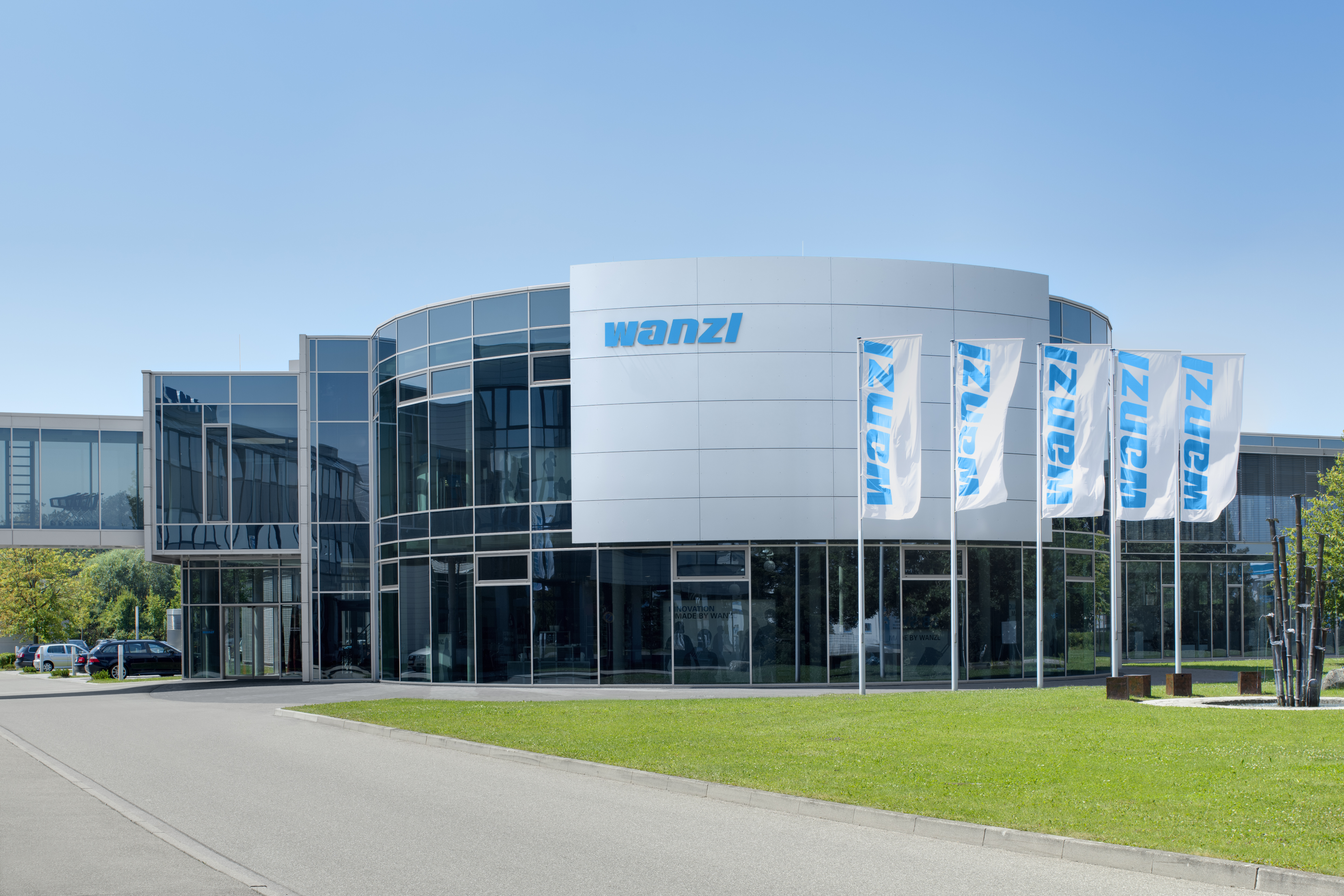 Wanzl Creative Center in Leipheim